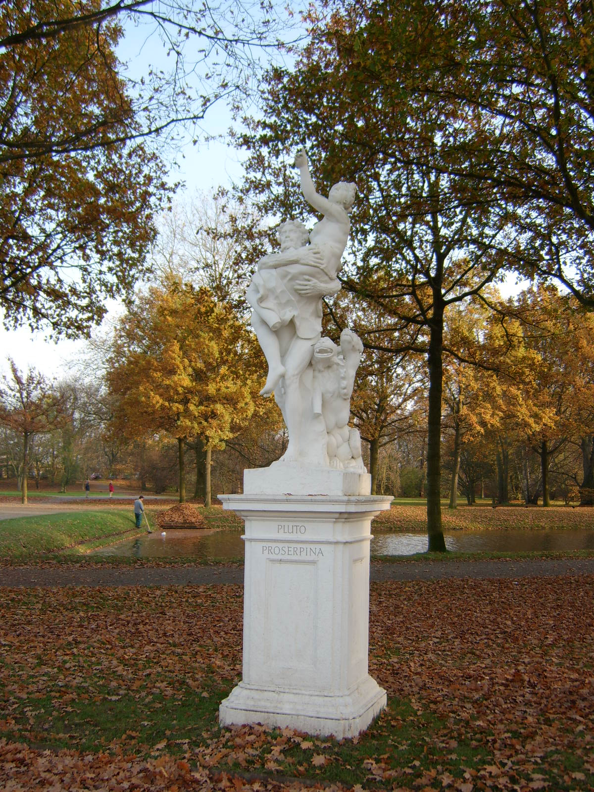 Skulptur in der Karlsaue (Kassel) an der Karlswiese, selbst photographiert Carroy, am 9.11.2005 um 1700, unbekannter Künstler, Raub der Proserpina durch Pluto 14:07, 11. Nov 2005 Carroy 1200 x 1600 (1532104 Byte) (Skulptur in der Karlsaue (Kassel) an der Karlswiese, selbst photographiert Carroy , am 9.11.2005)